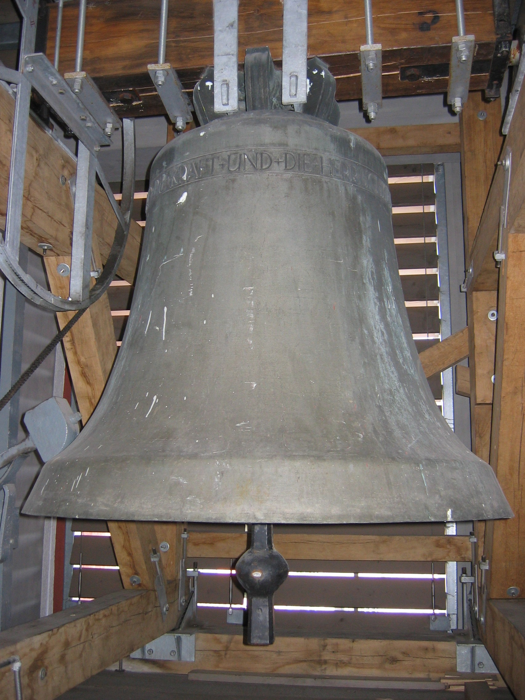 Zweitgrößte Glocke in der Münchner Matthäuskirche